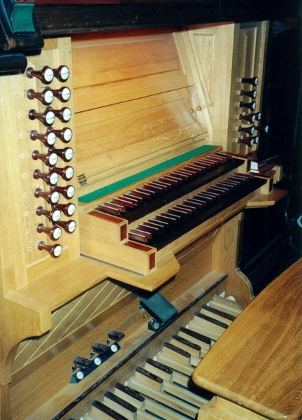 Sielschrank der Orgel der ev.-luth. Erlöser-Kirche in Hannover-Linden. Gehäuse: P. Furtwängler & Söhne, Orgelwerk: Emil Hammer Orgelbau